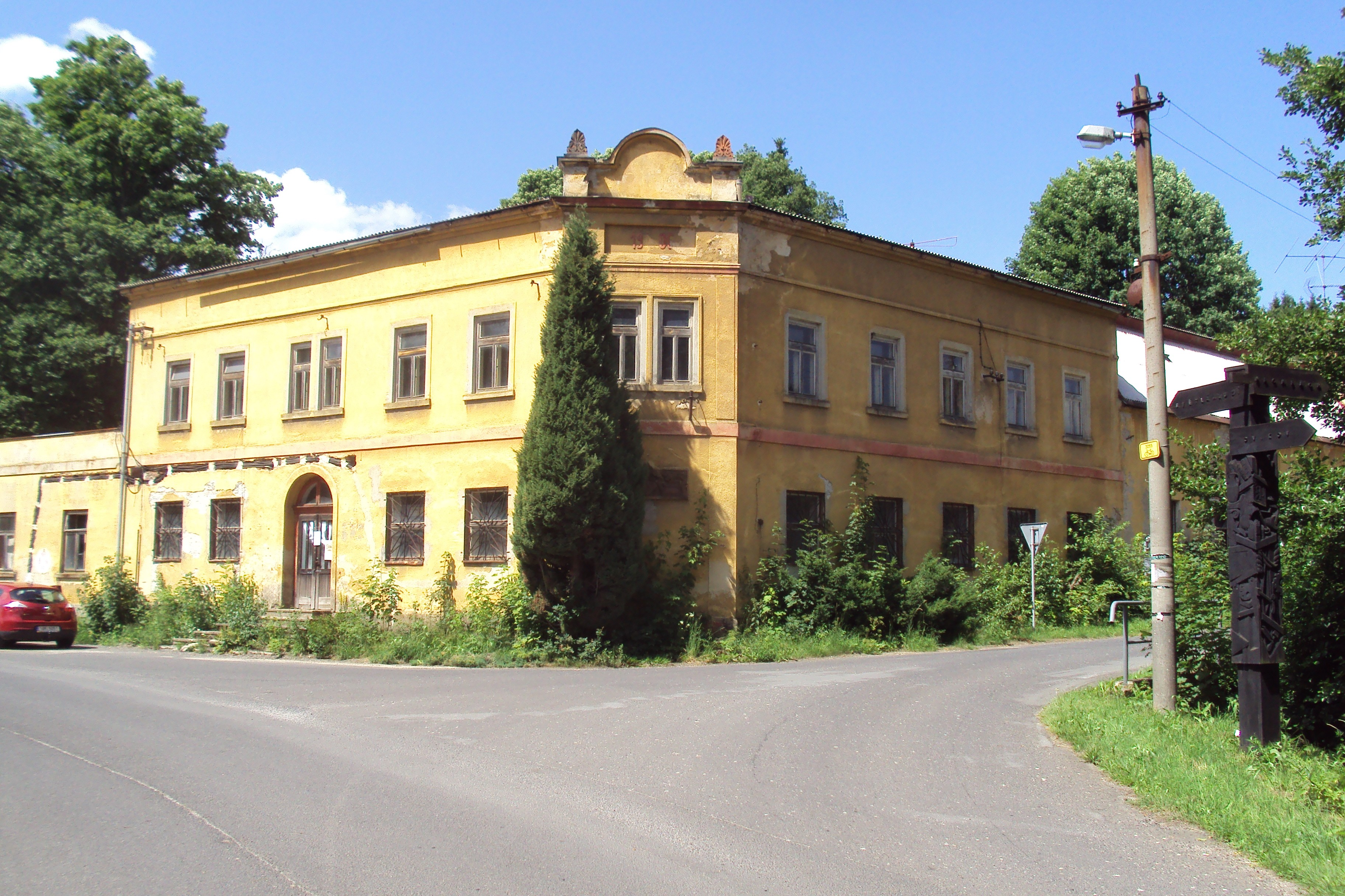 Rohový dům v obci Juliovka, pravá silnice vede na Krompach